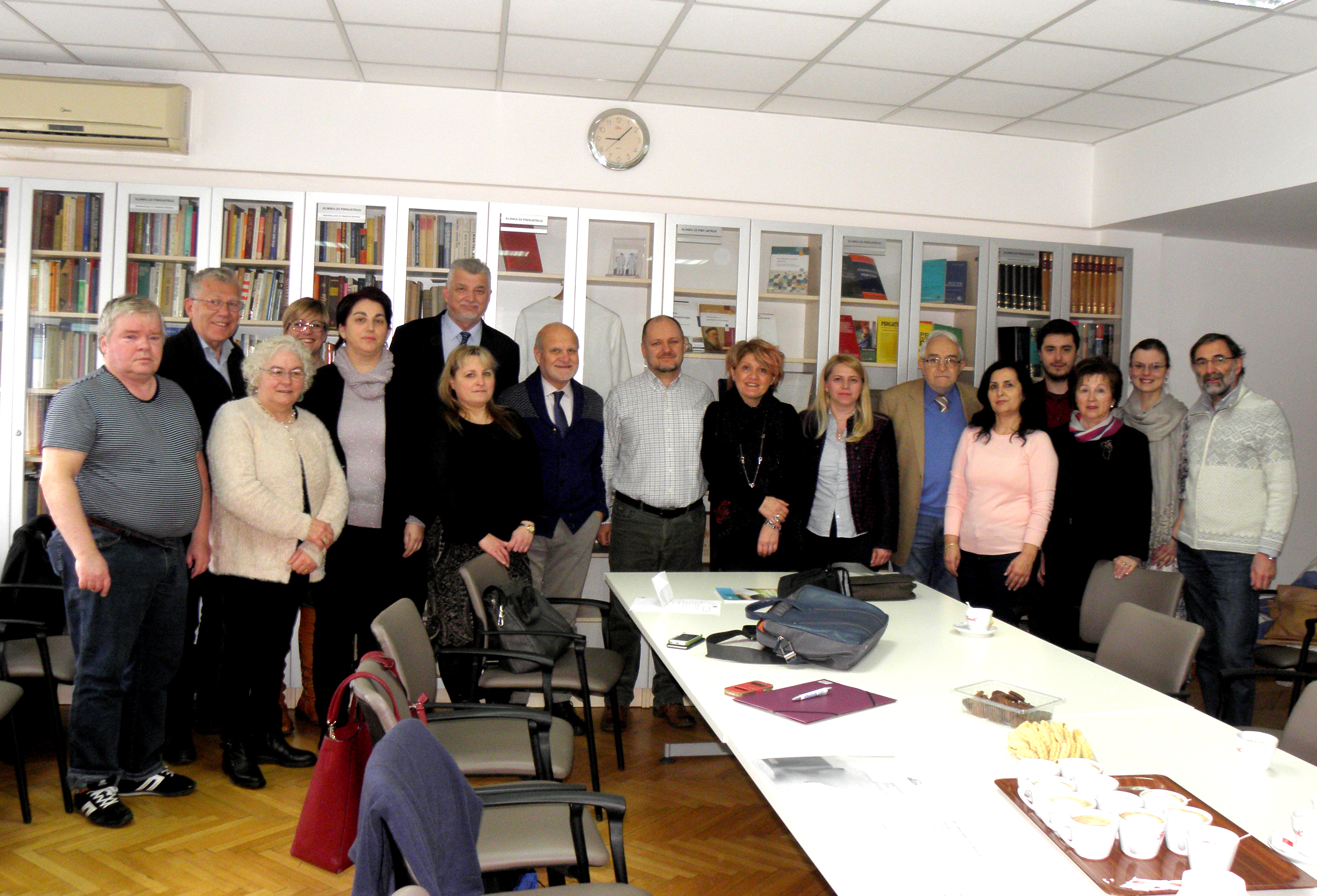 WACAT 2018